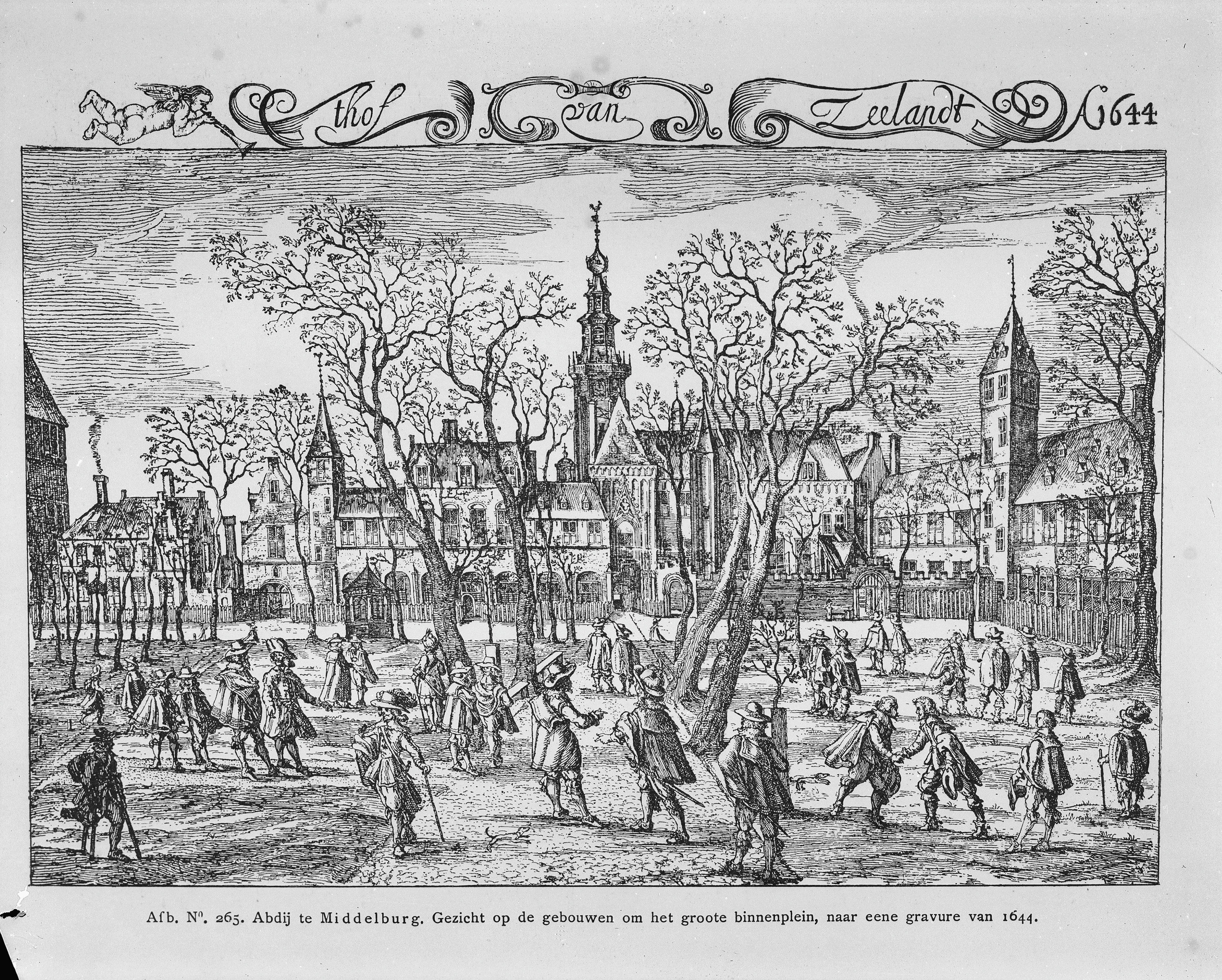 Abdij En Nieuwe Kerk: als Hof van Zeeland in 1644